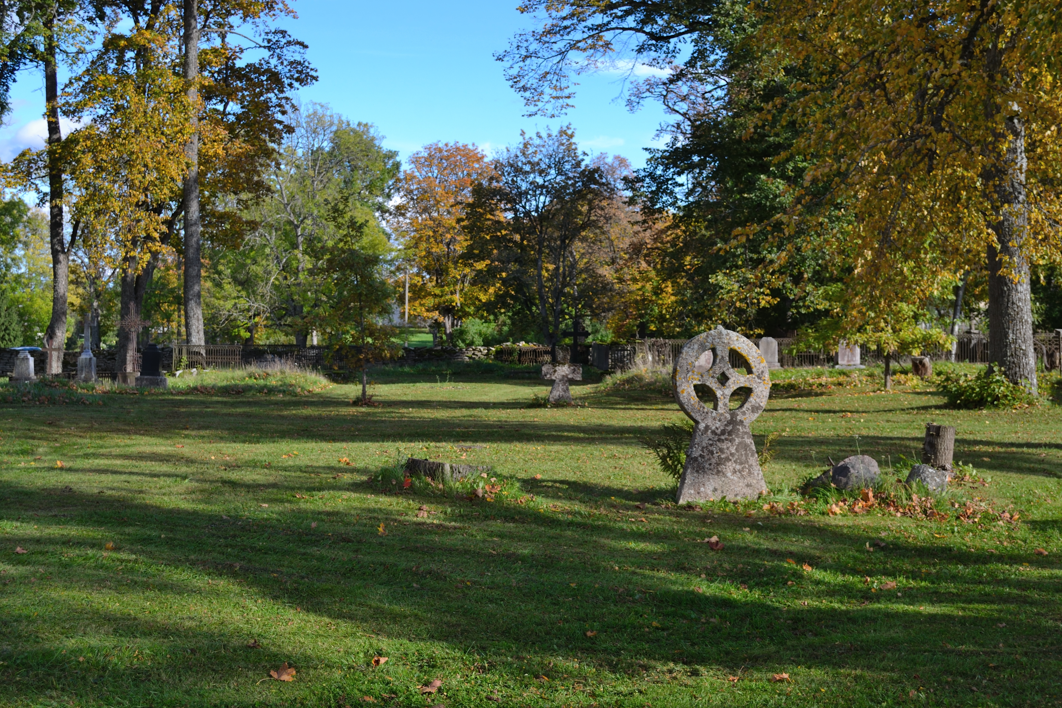 Juuru kirikuaed